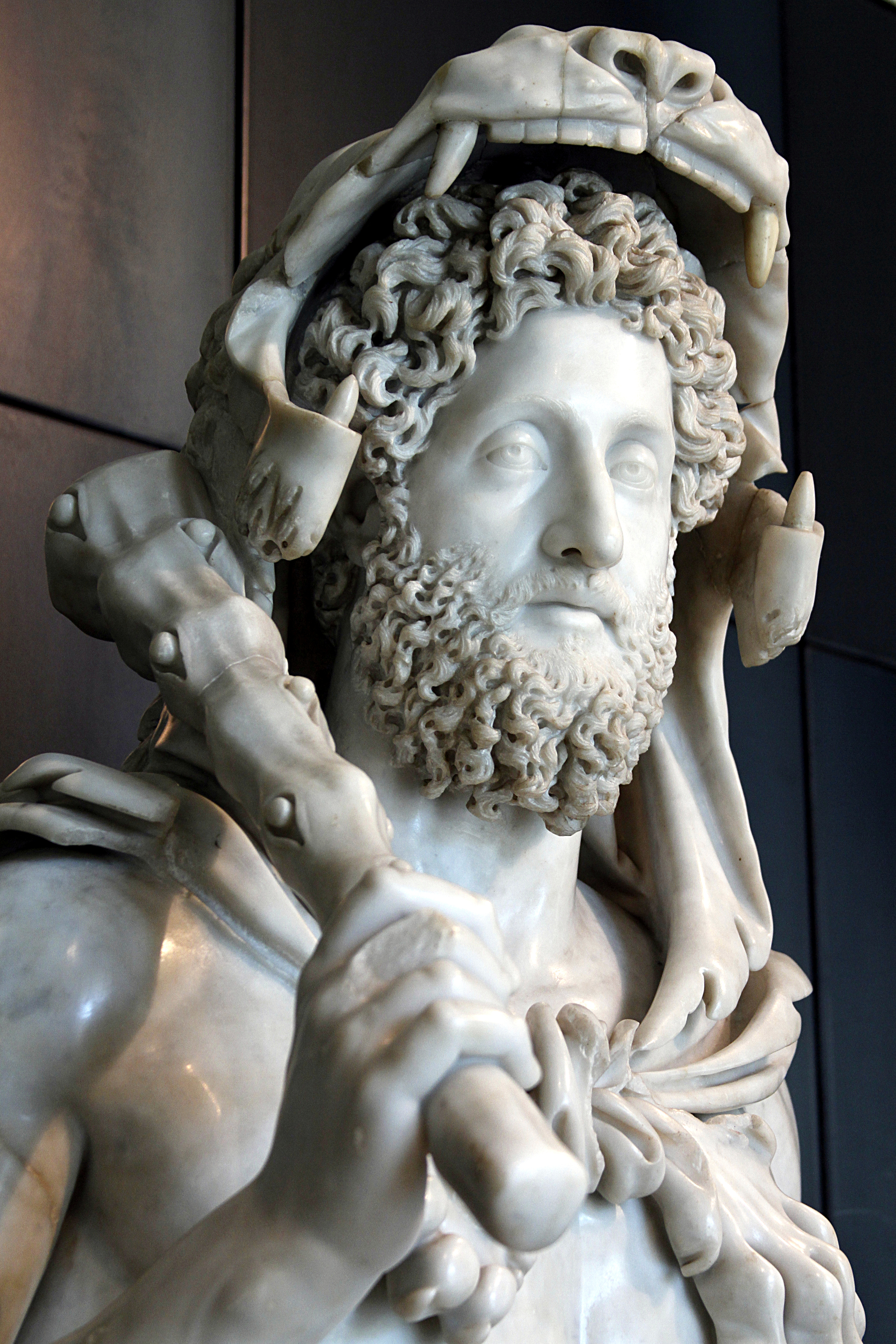 Musei Capitolini - Rome